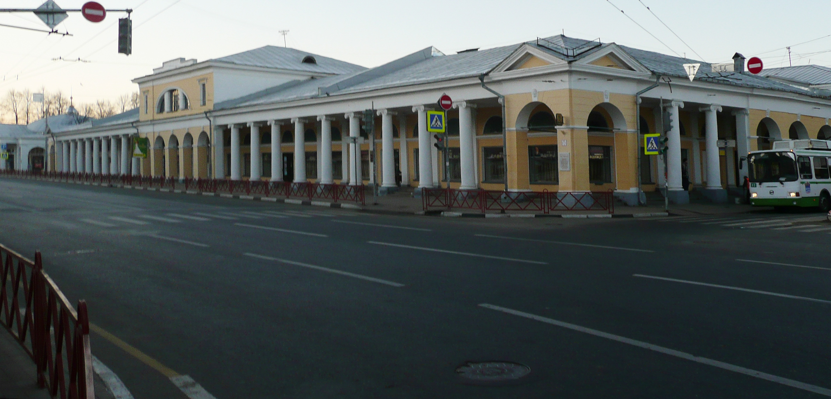 Корпус северный: улица Первомайская, 10, Ярославль, Ярославская область